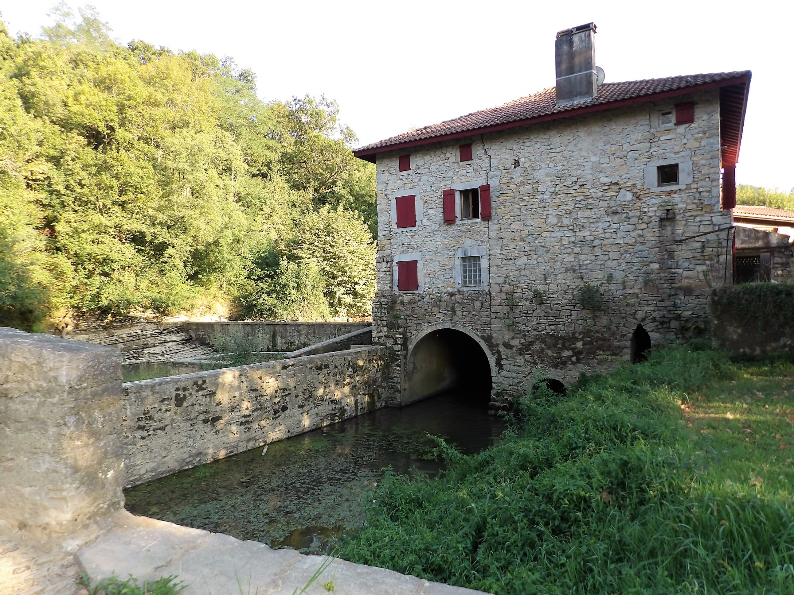 Pont de Gramont et Moulin de Heugas